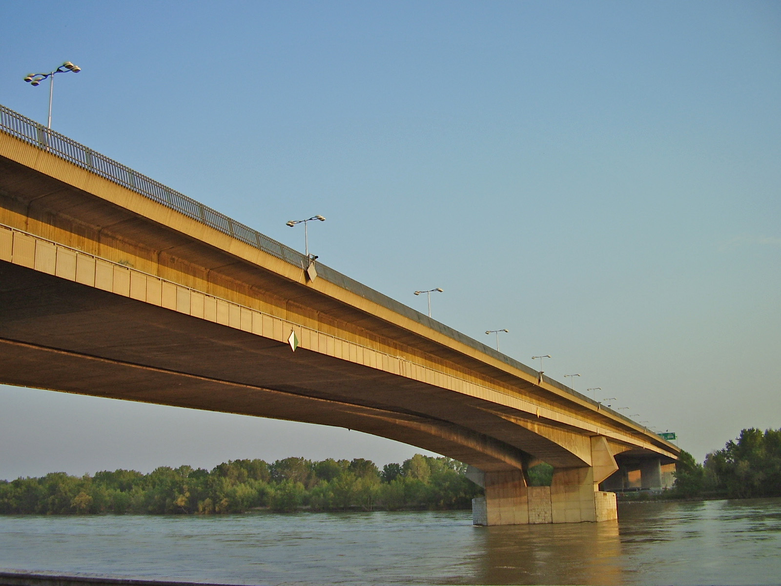 Lafranconi-Bréck